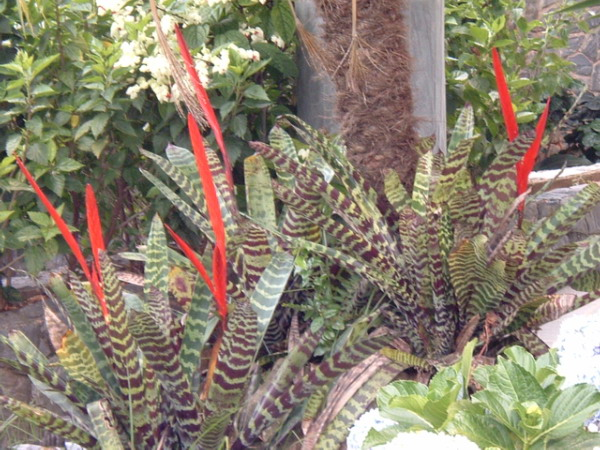 Species [Vriesea splendens Familia Bromeliaceae A Cultivar Bromeliaceae Bromeliaceae